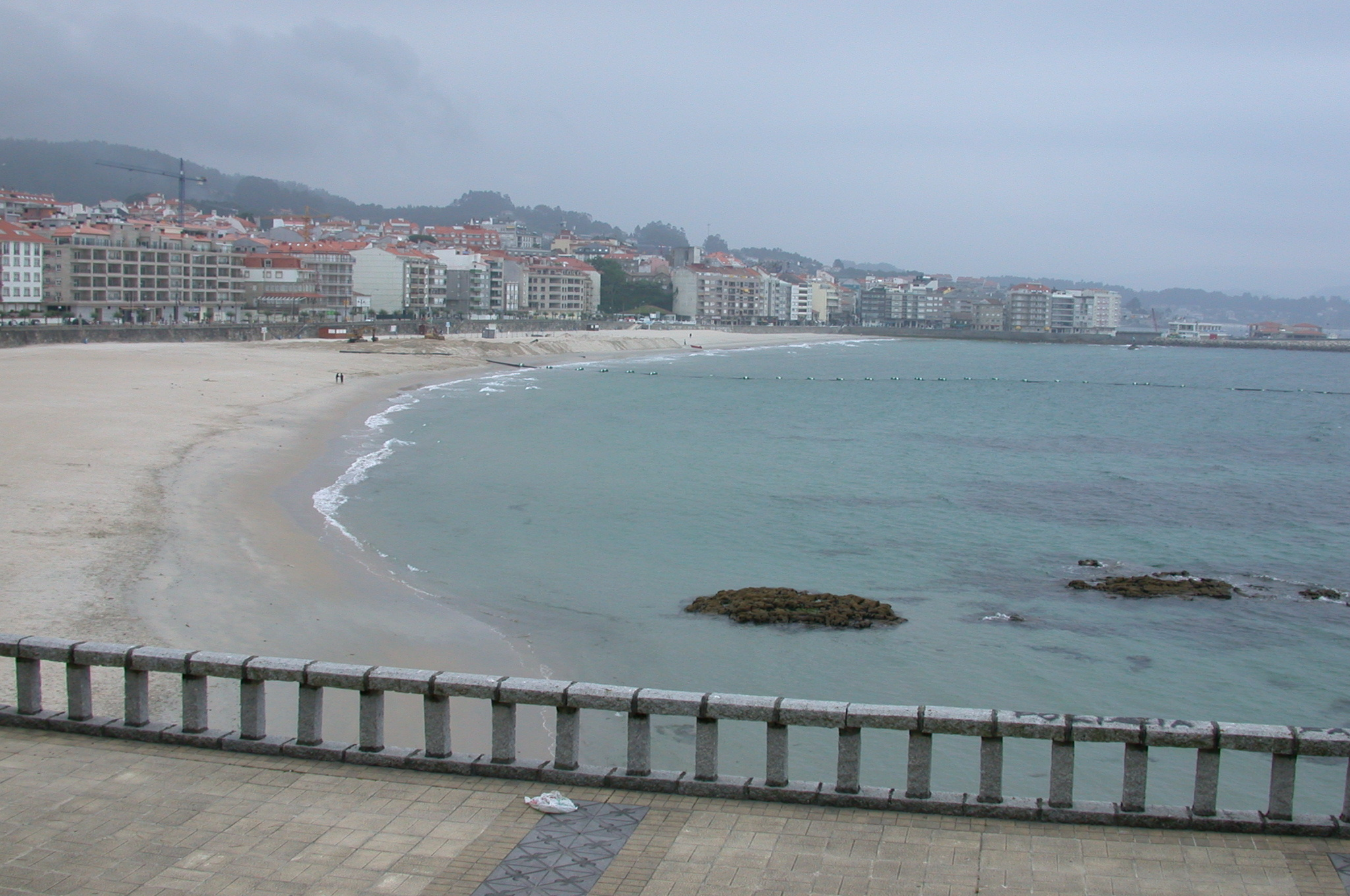 Praia de Silgar, Sanxenxo